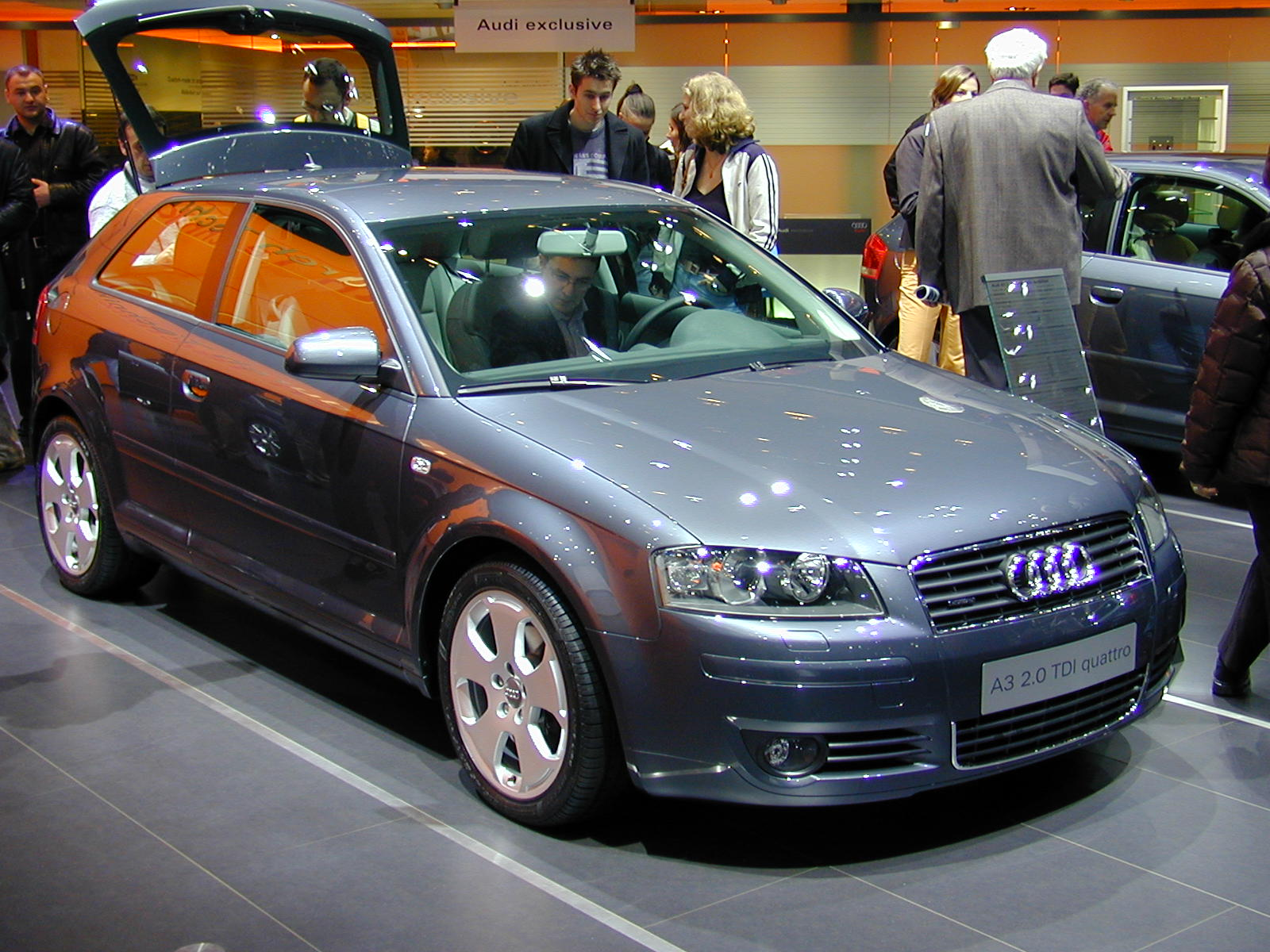 Salon de Genève 2004 SAG2004 084 Audi A3